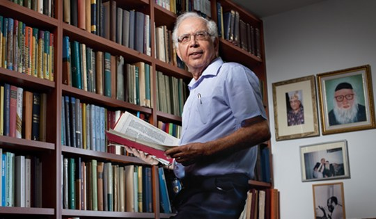 פרופסור לבלשנות משה בר-אשר